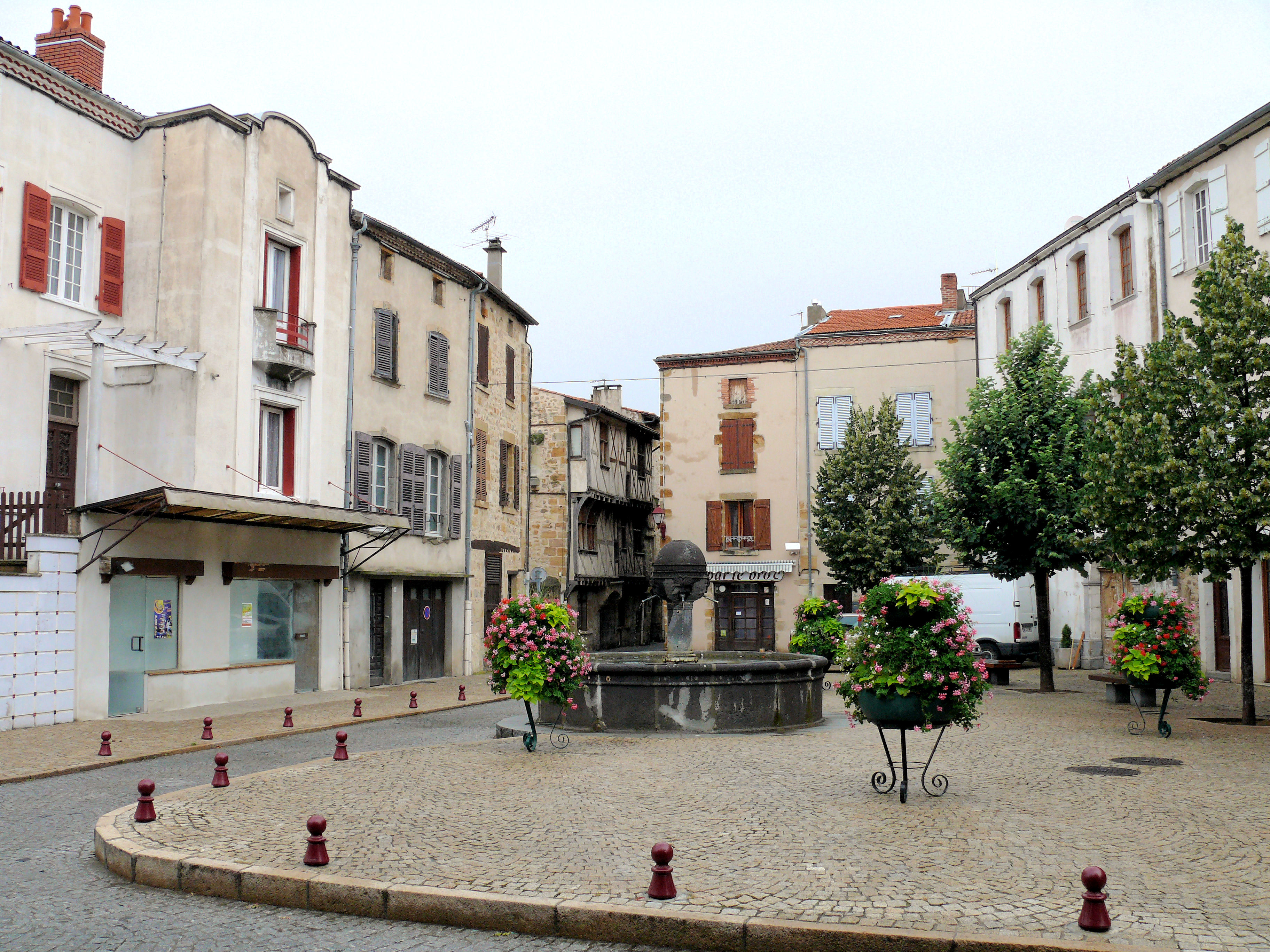 Vic-le-Comte - Place du Vieux-Marché